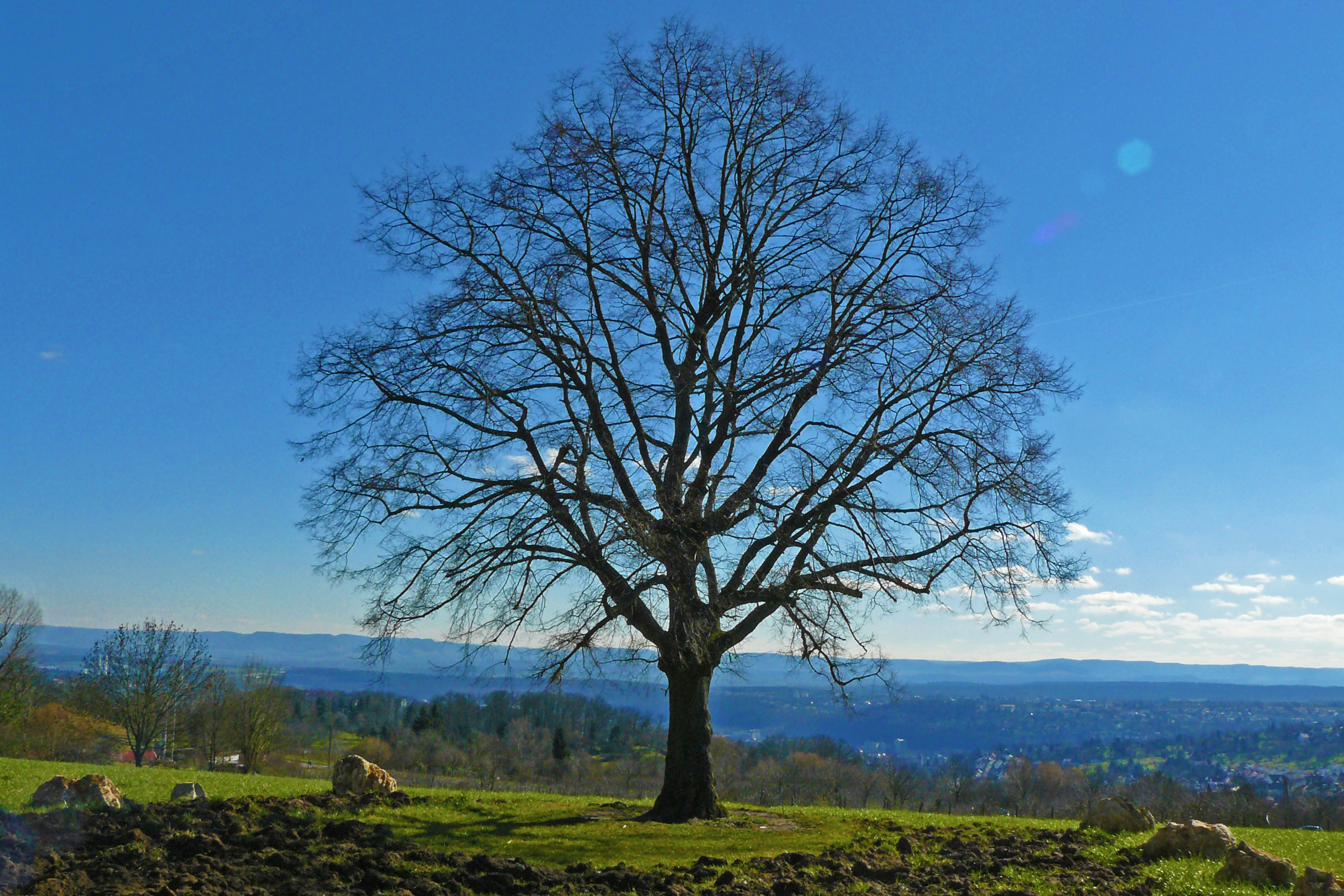 Die Katharinenlinde steht bei Krummenacker im Landschaftsschutzgebiet „Esslingen“ (LSG 1.16.082) und deutet auf die Sage der hl. Katharina hin